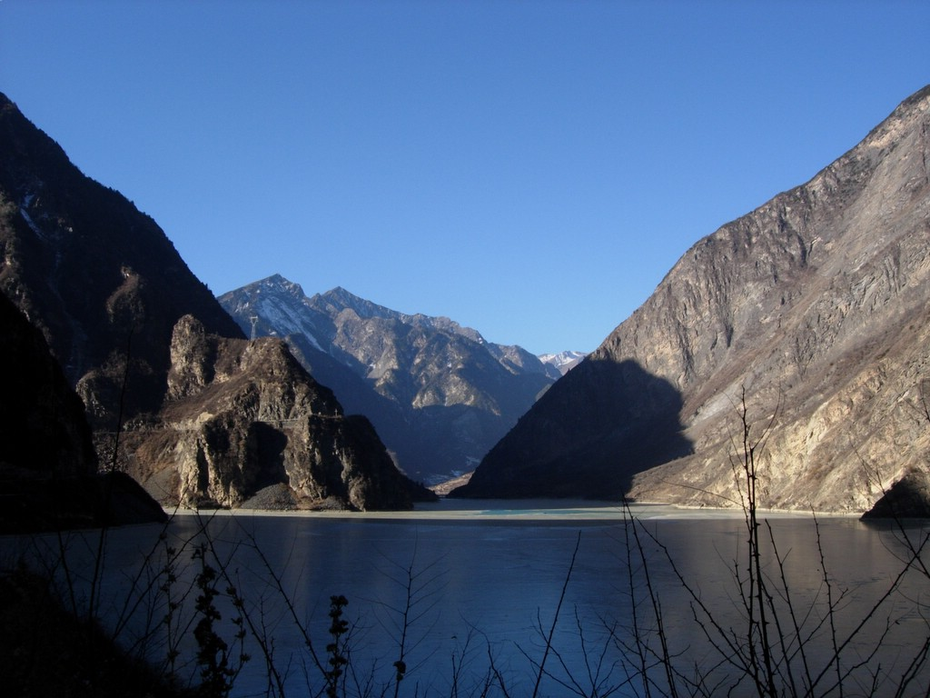 overlap brook lake 叠溪海子 photo by Memes